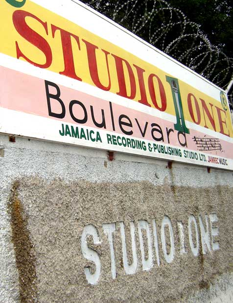 Studio One. Foto: Dubdem e FabDub.